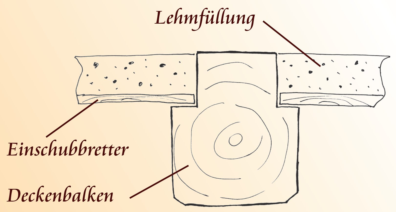 Holzbalkendecke mit Einschubbrettern und Lehmfüllung im Kulturdenkmalhaus Umgebinde 1587 cultural heritage Wooden ceilings